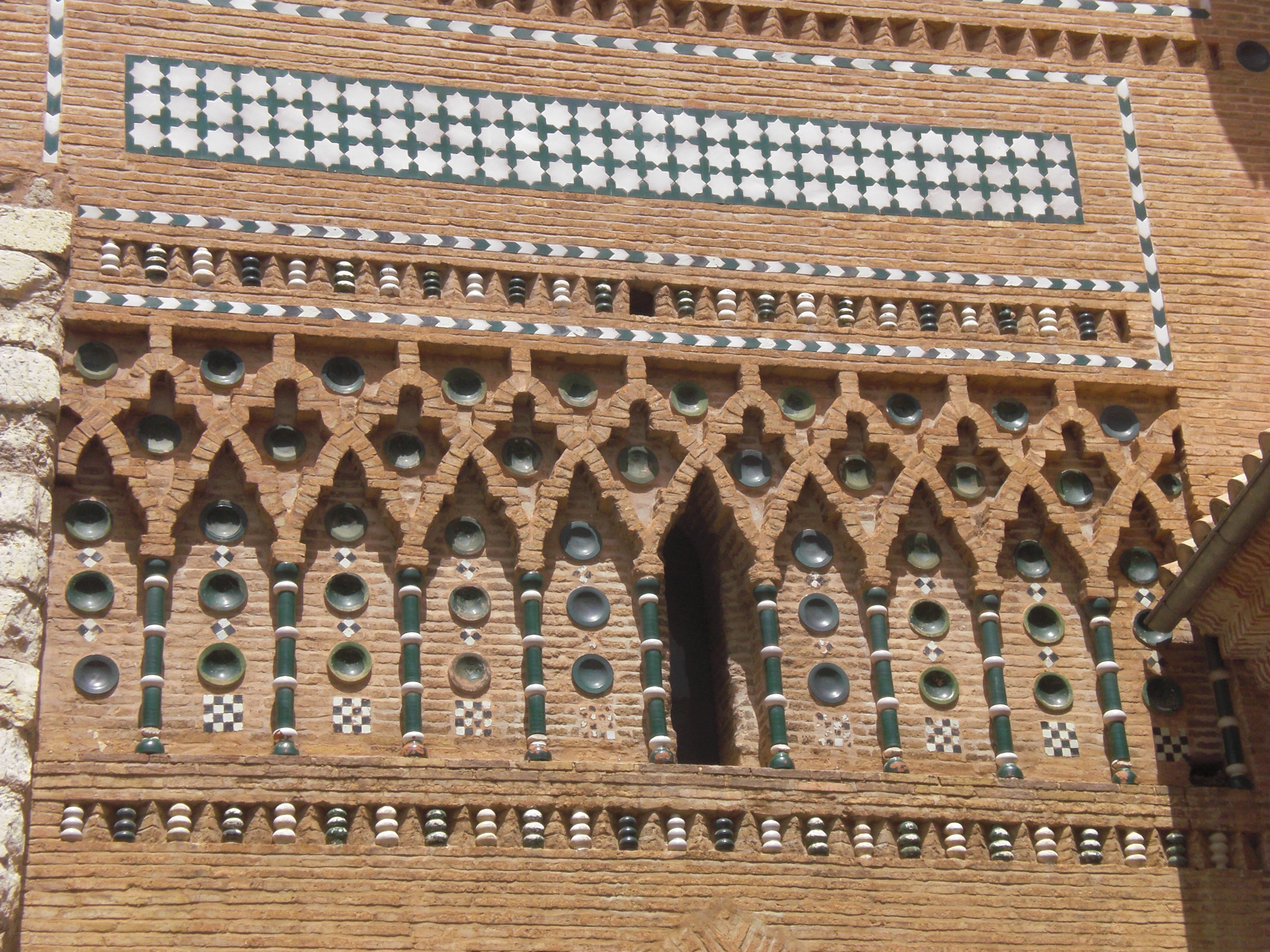 Turo de Sankta Marteno